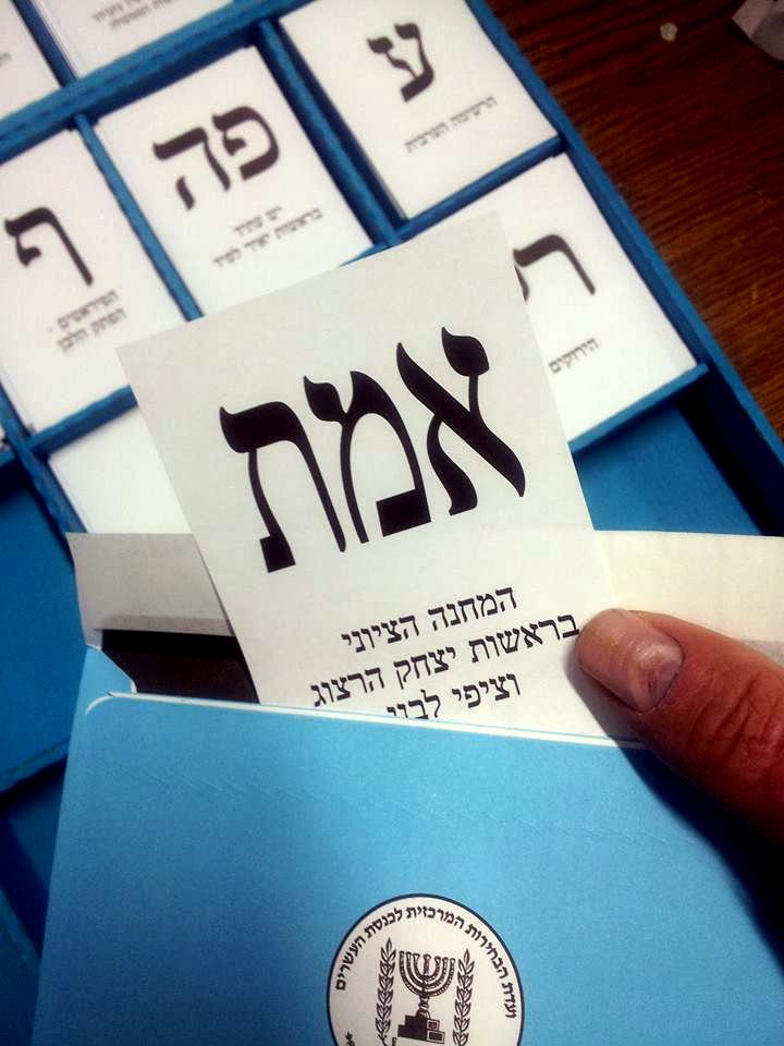 פתק המחנה הציוני בקלפי